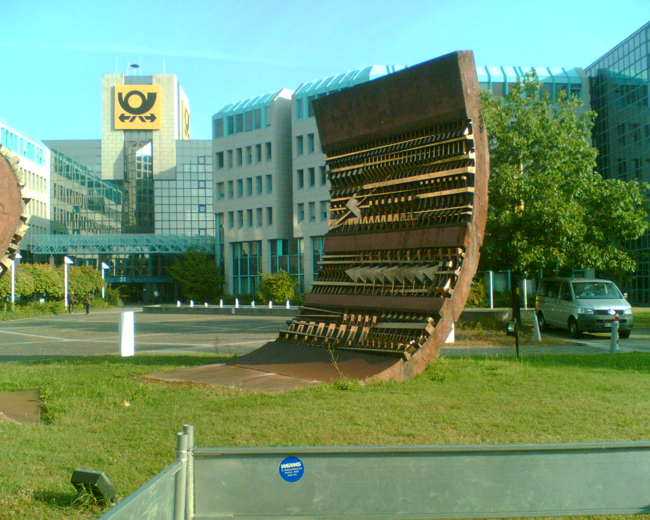 Skulptur des Bildhauers Arnaldo Pomodoro in Darmstadt, Deutschland.